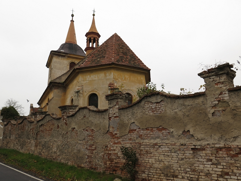 Kostel Nanebevzetí Panny Marie, náves, Bošín (Křinec).